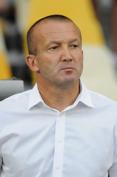 Роман Йосипович Григорчук - український футбольний тренер, колишній футболіст. Матч «Чорноморець» Одеса - «Динамо» Київ (2:1).